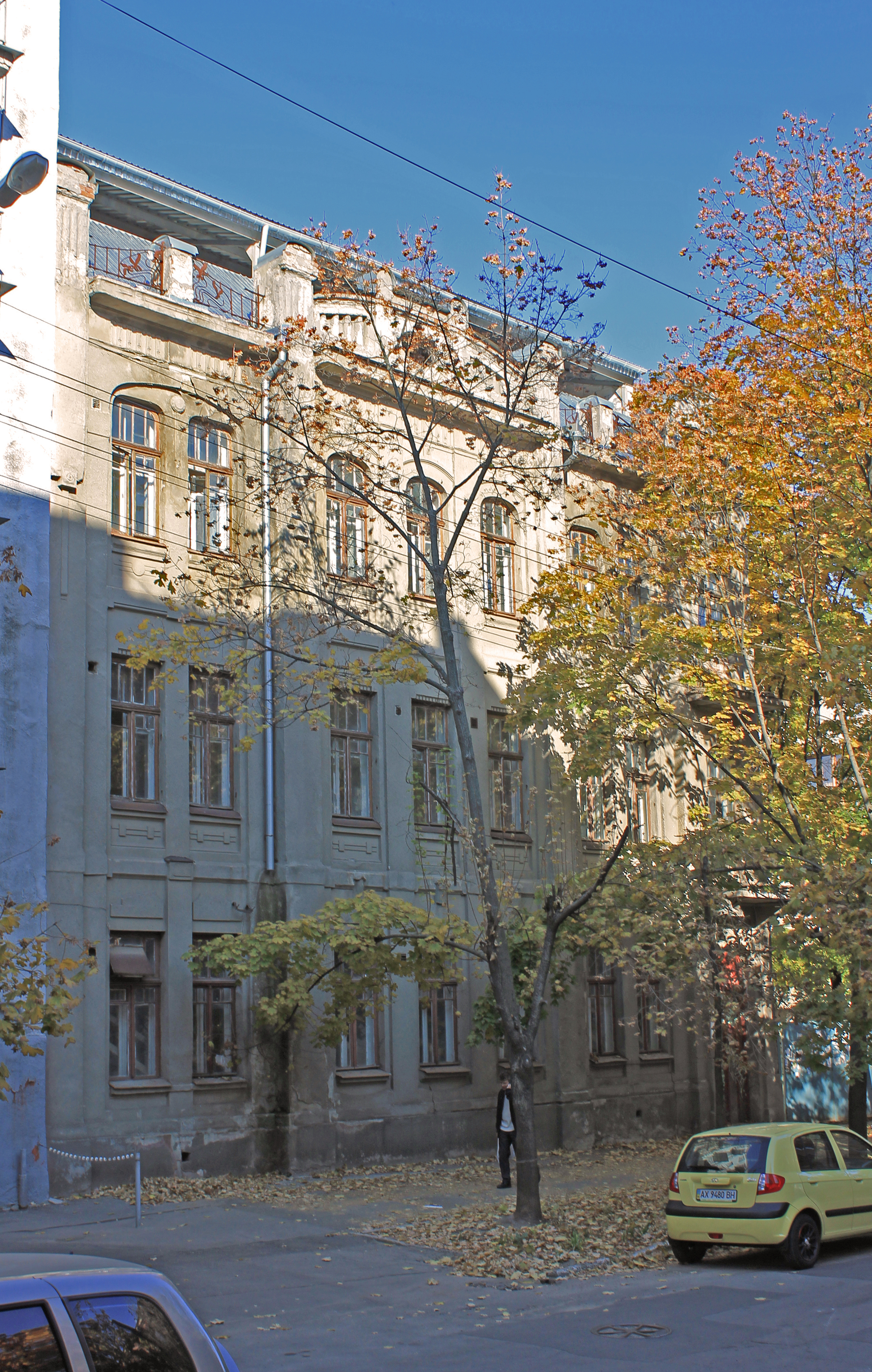 Житловий будинок 1913р., вул.Чайковська, 21, м.Харків.